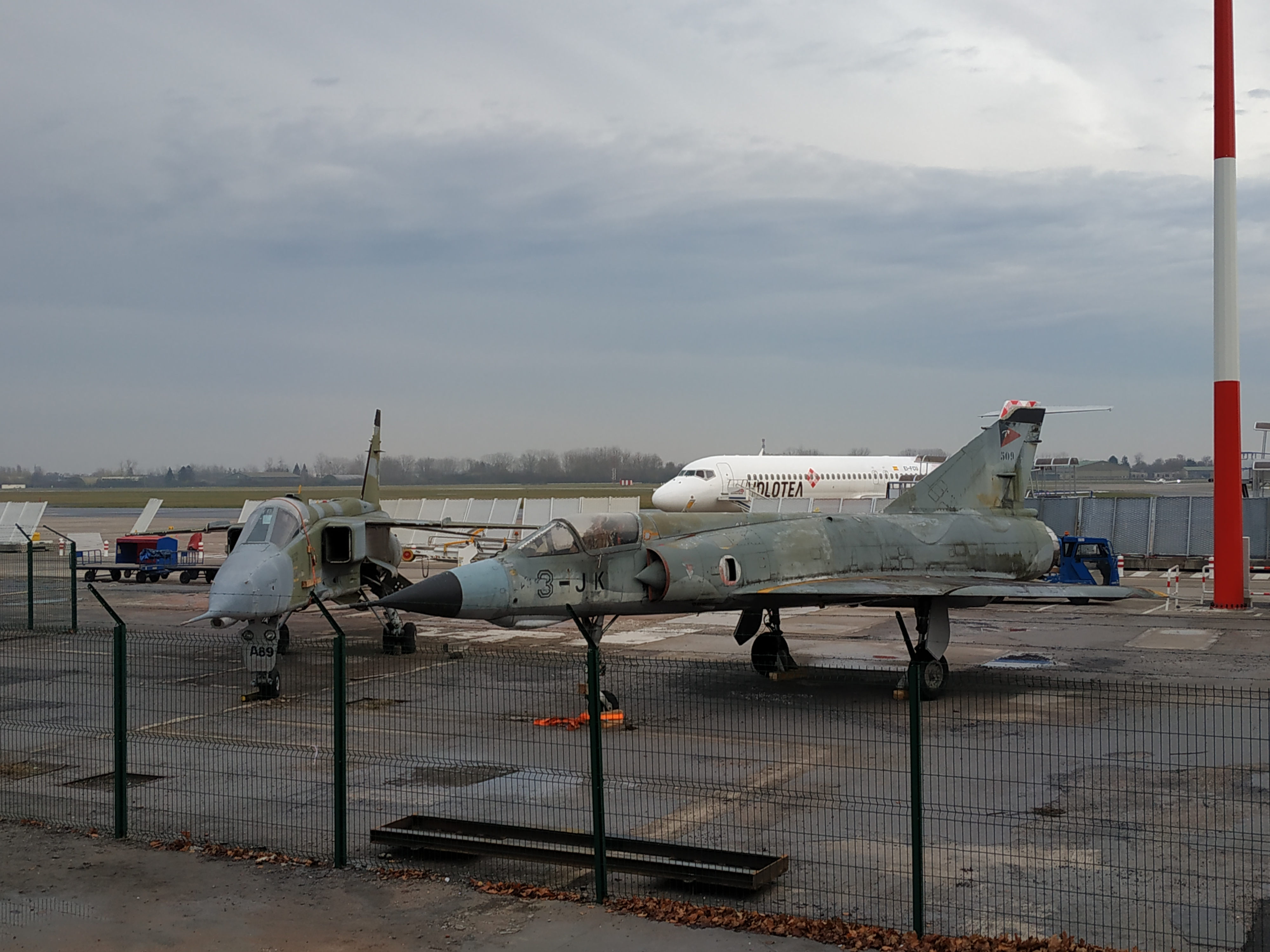 Jaguar & Mirage IIIE exposés à l'aéroport de Strasbourg-Entzheim en 2018 (avant rénovation ?)